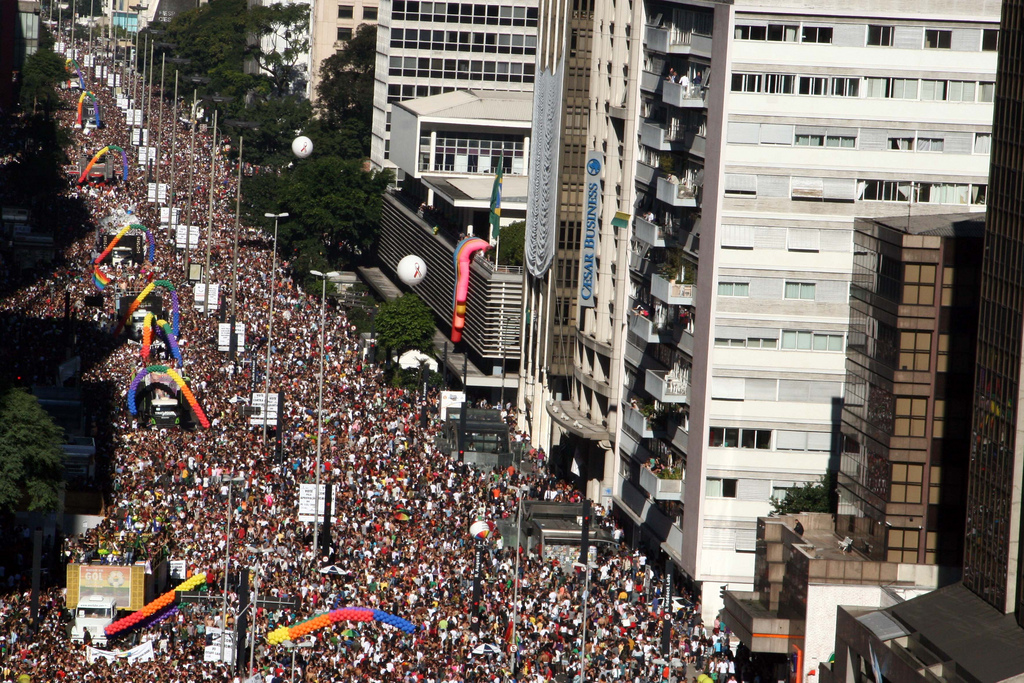 Parada do Orgulho LGBT de 2010, em São Paulo, Brasil.